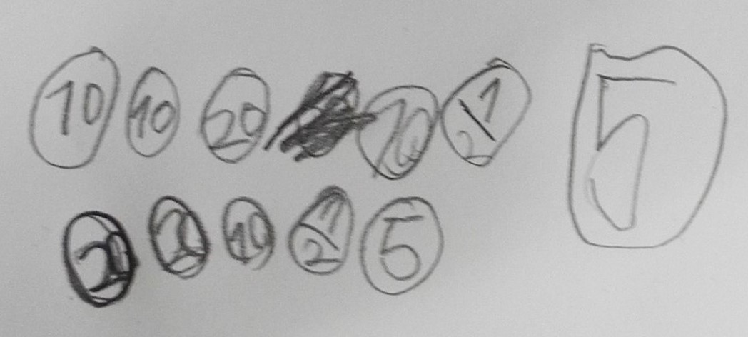 Invarianz von 6 sFr. Variationen von Erstklässlern